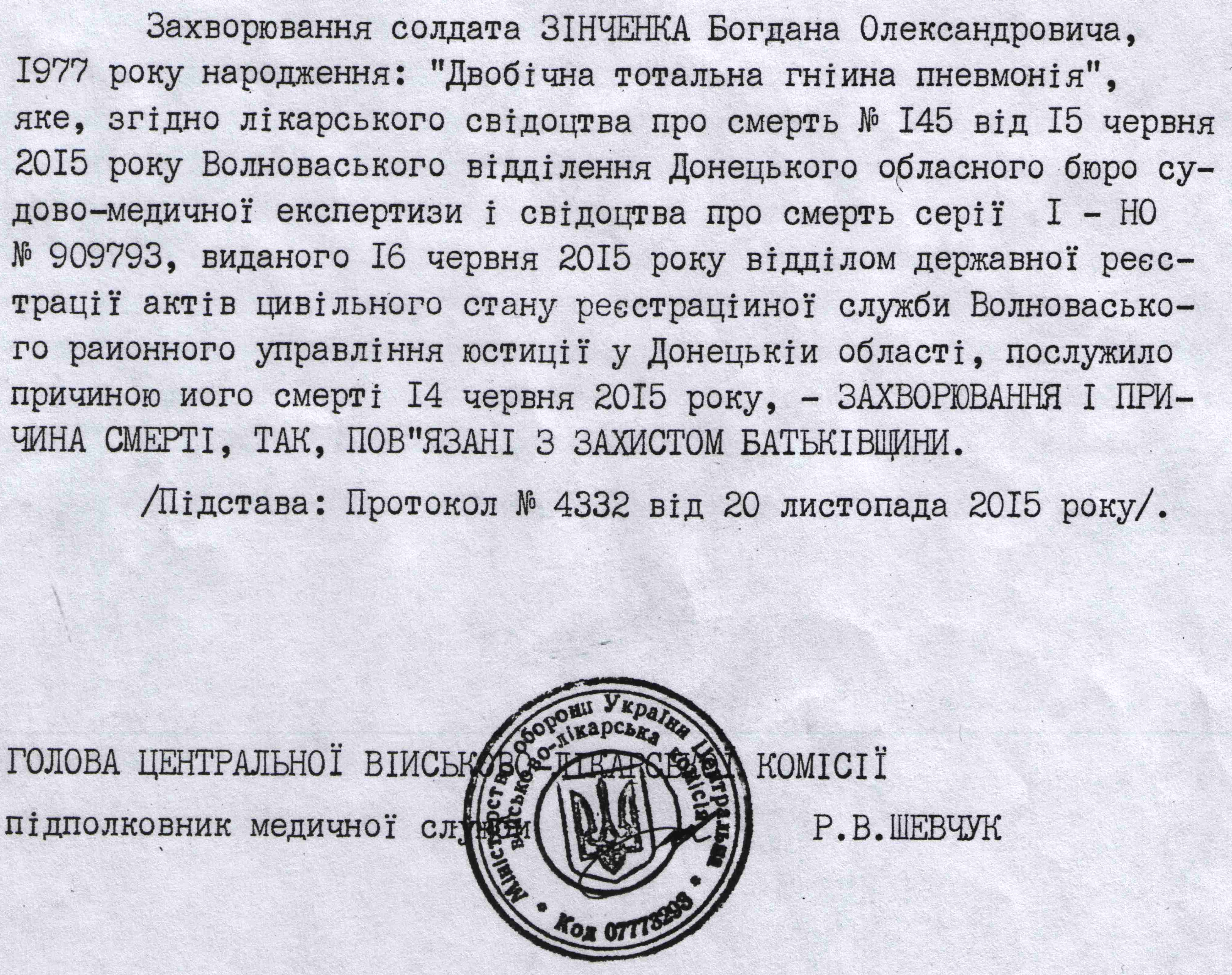 довідка